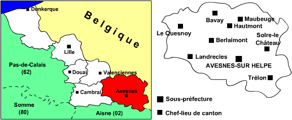 Image created by user:Manchot sanguinaire Carte de l'arrondissement d'Avesnes-sur-Helpe (Nord, 59) avec chefs-lieux de canton Utilisateur:Manchot sanguinaire